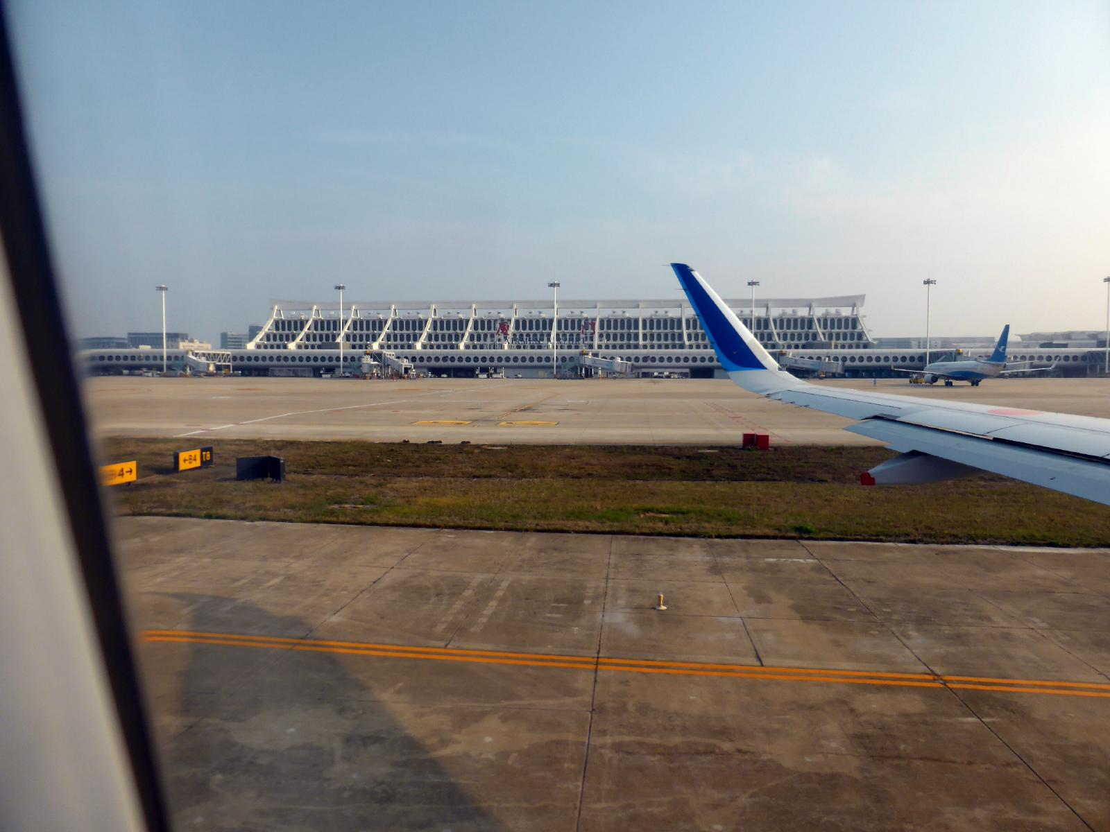 滑走路側から見たアモイ空港